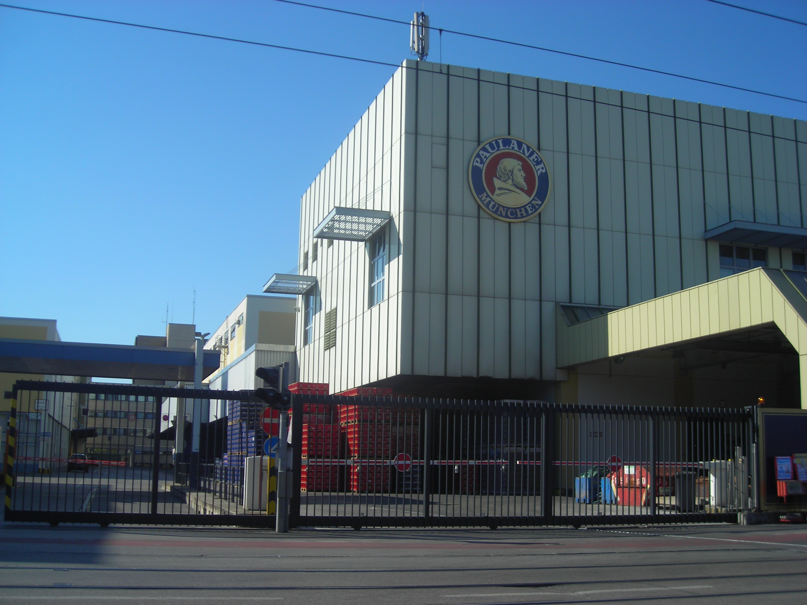 Munich